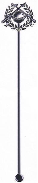 pedelstaf van de senaat Vindicat atque Polit